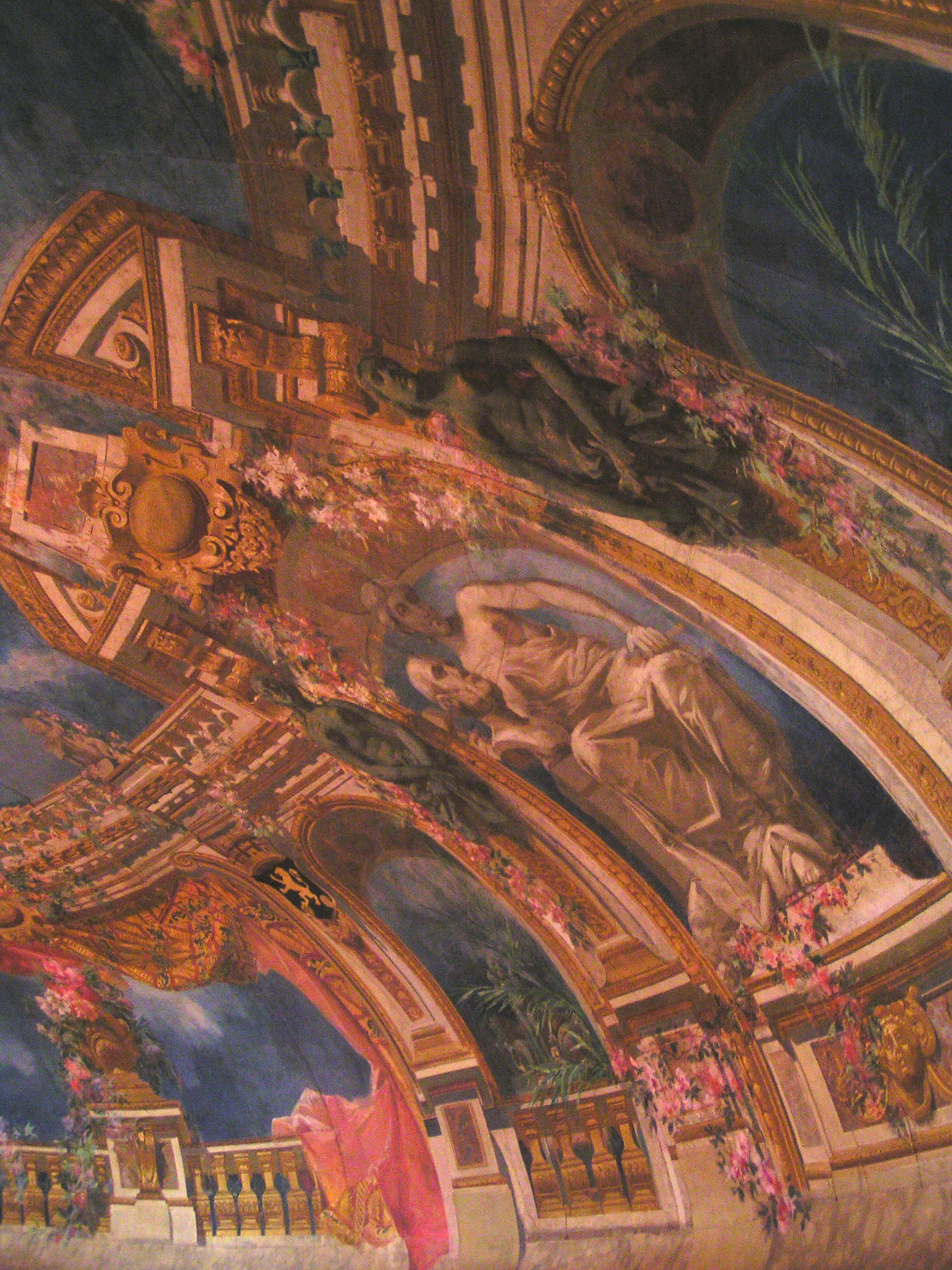 Opera royal de la Monnaie, Salle de spectacle, détail des peinture de la coupole.